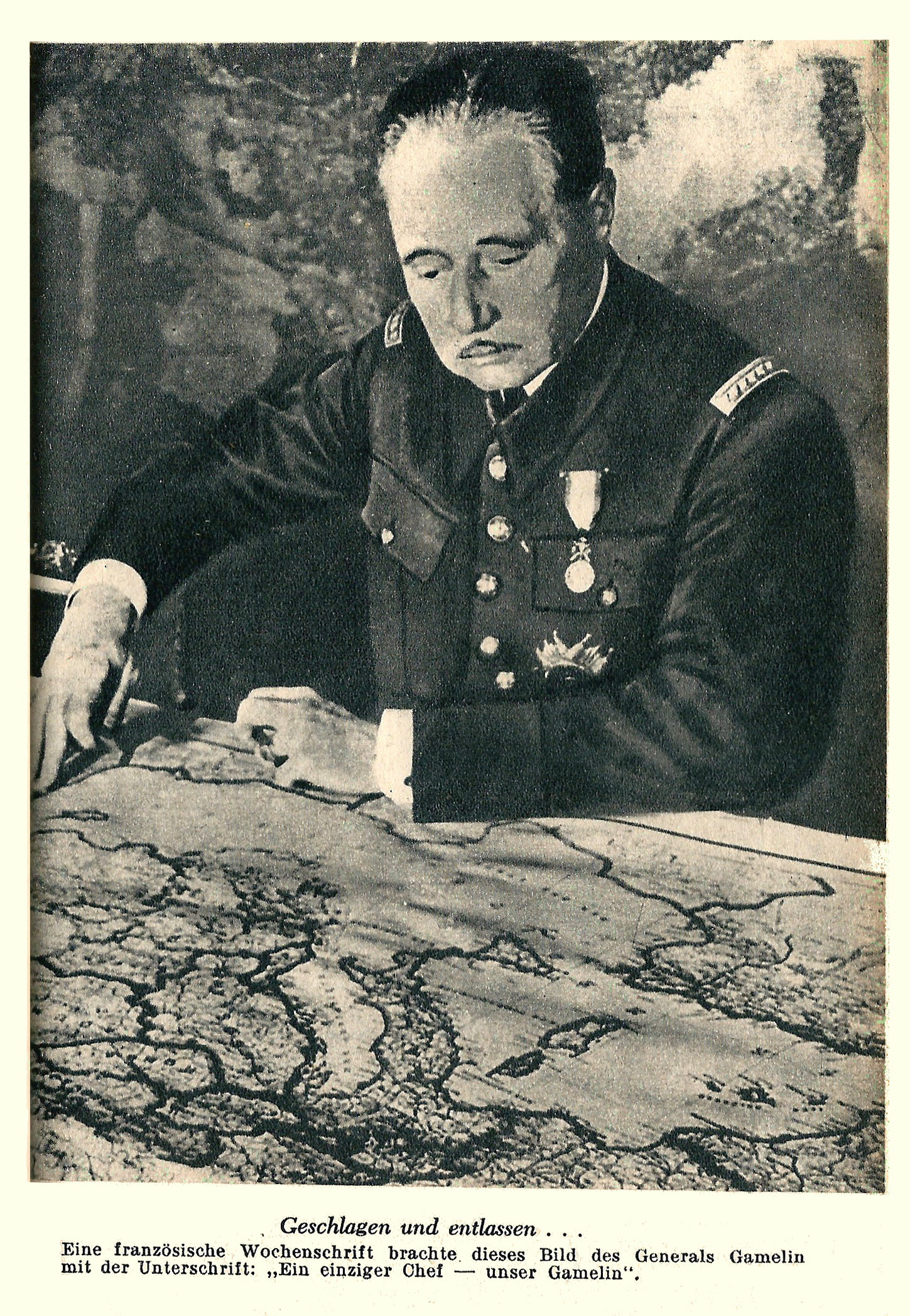 Image (dessin) de Maurice Gamelin qui étudie une carte.